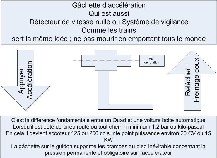 Gachette Quad